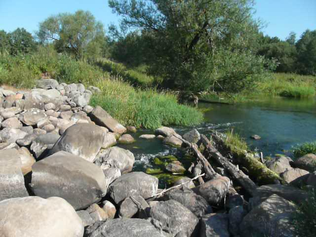 Остатки мельничной плотины на Рачайне